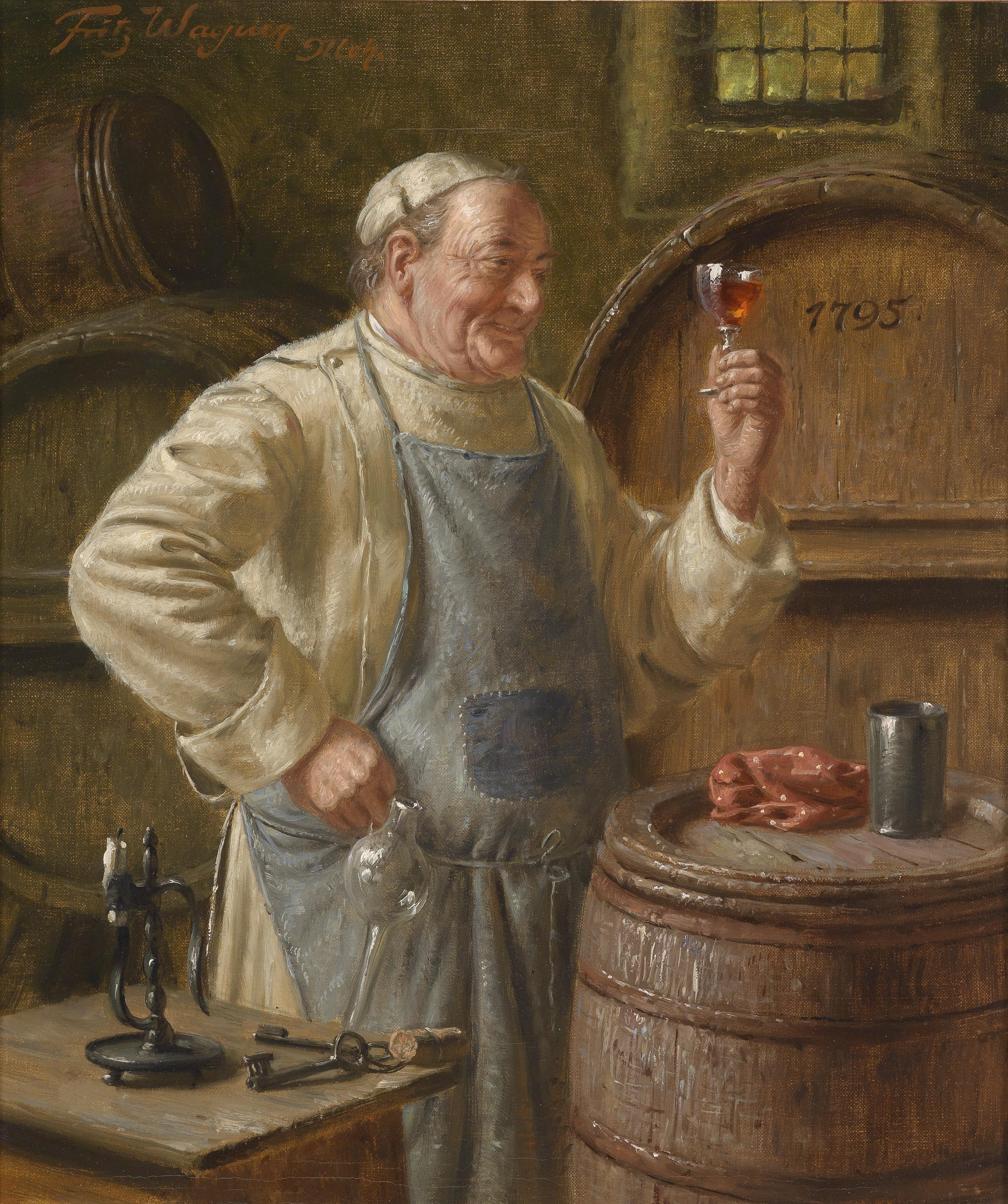 Ein guter Schluck, signiert Fritz Wanger Mchn, Öl auf Leinwand, 35,5 x 30 cm